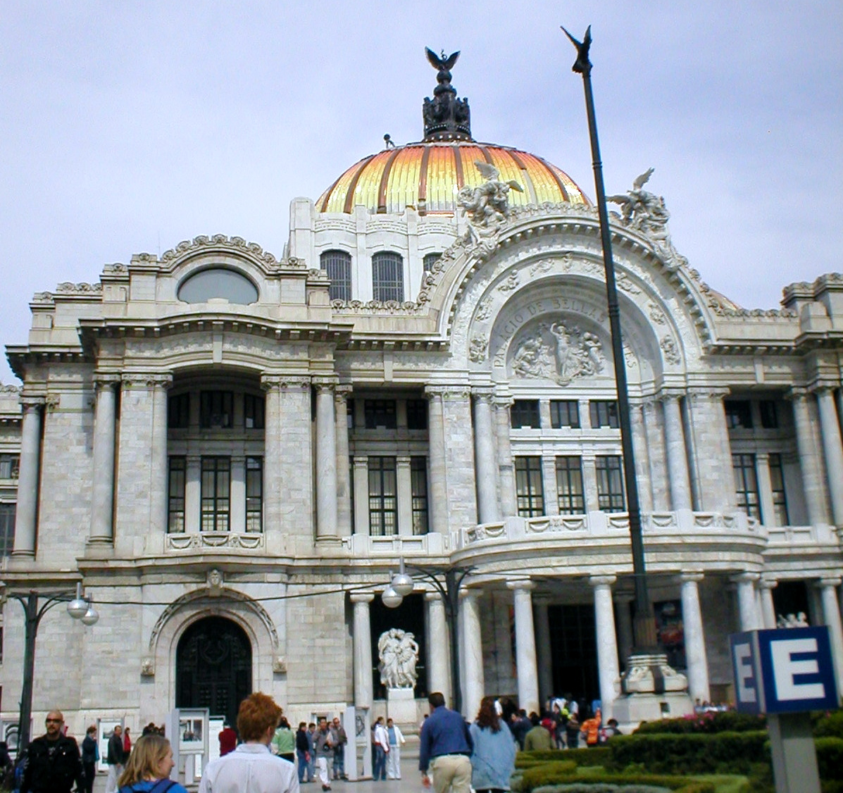 Palau de Belles Arts, Ciutat de Mèxic.